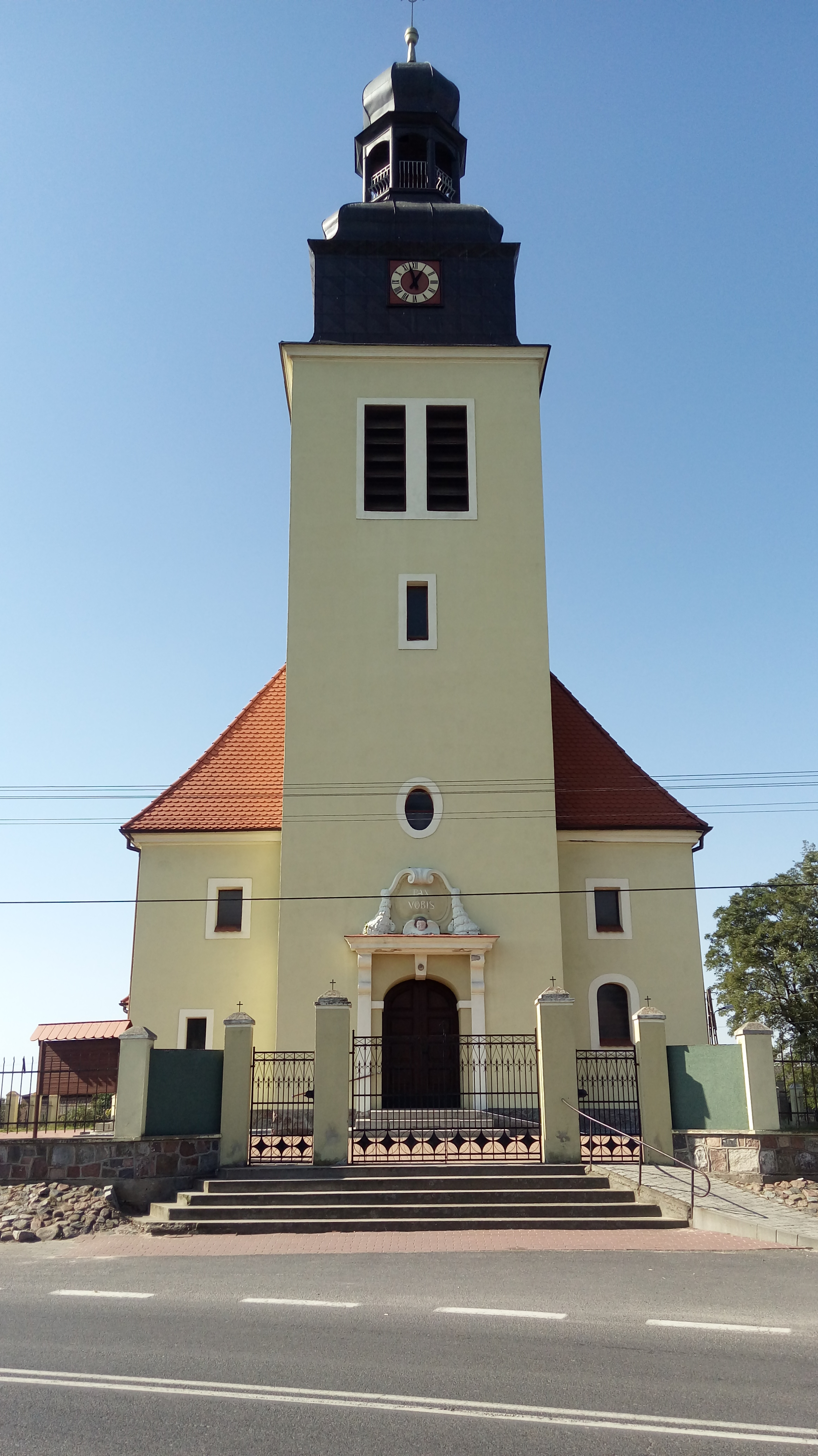 Zdjęcie Kościoła w Wójcinie